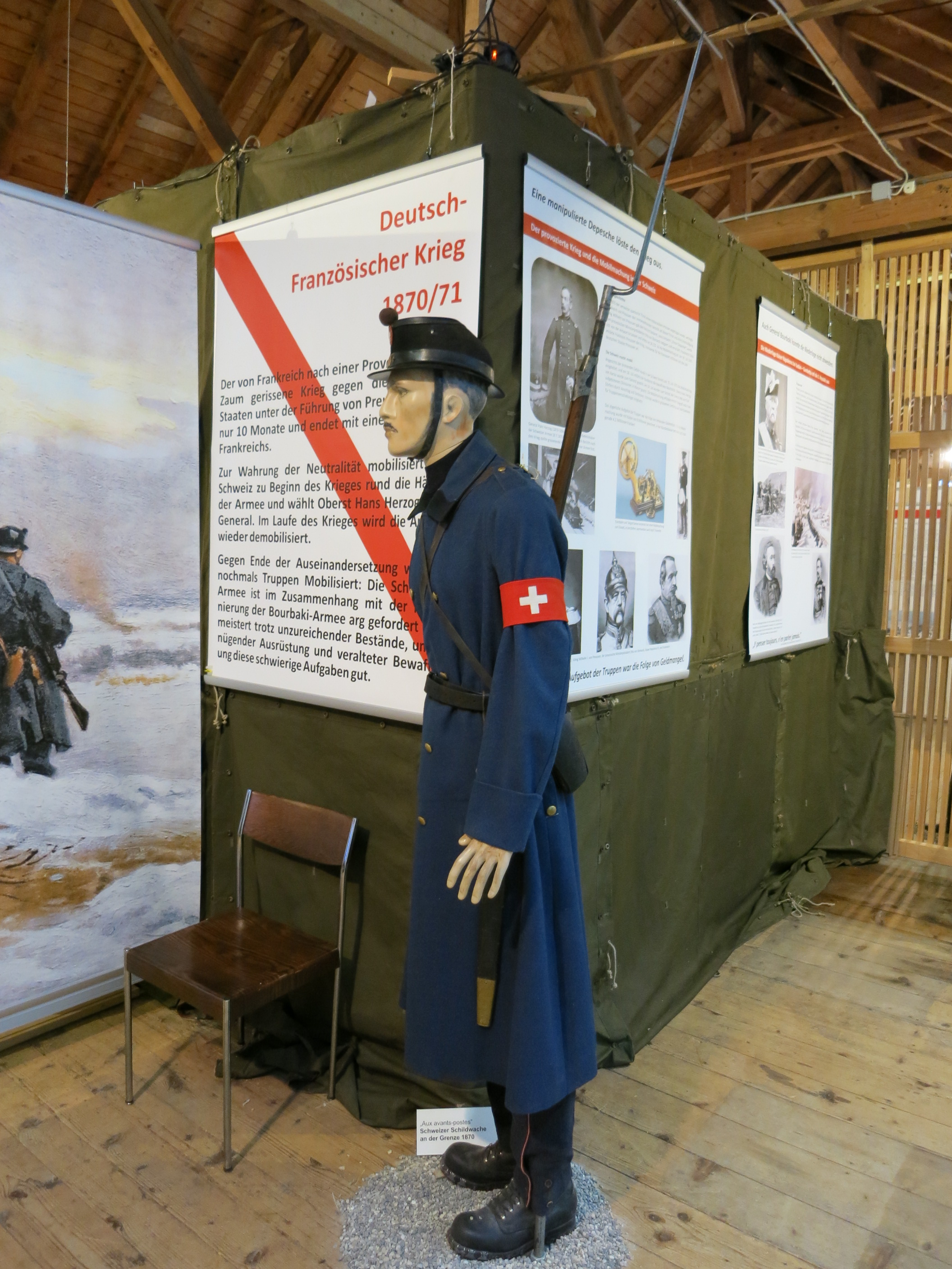 Museum im Zeughaus, Schaffhausen SH, Schweiz